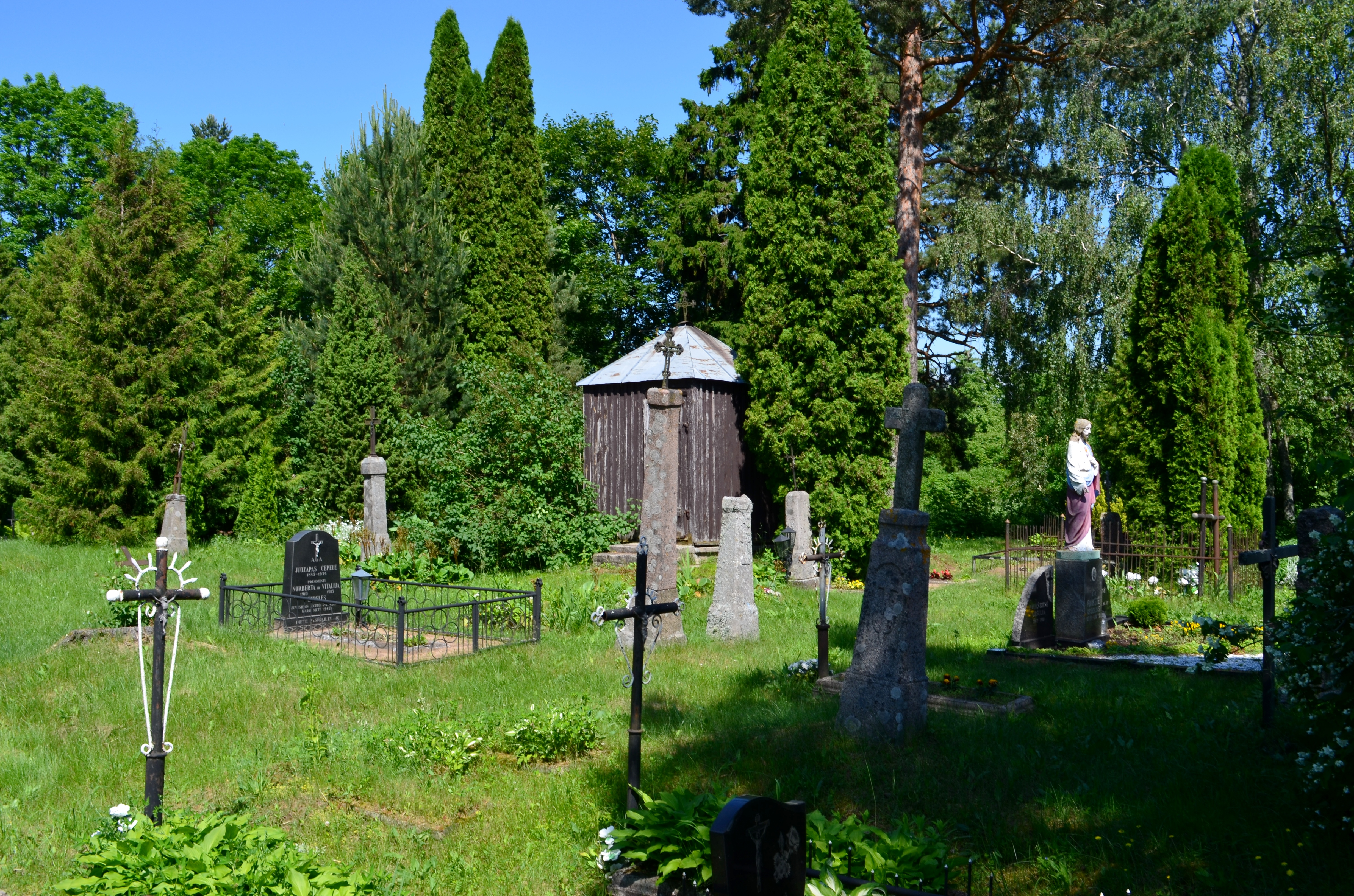 Čižiūnų kapinės, Ignalinos r.